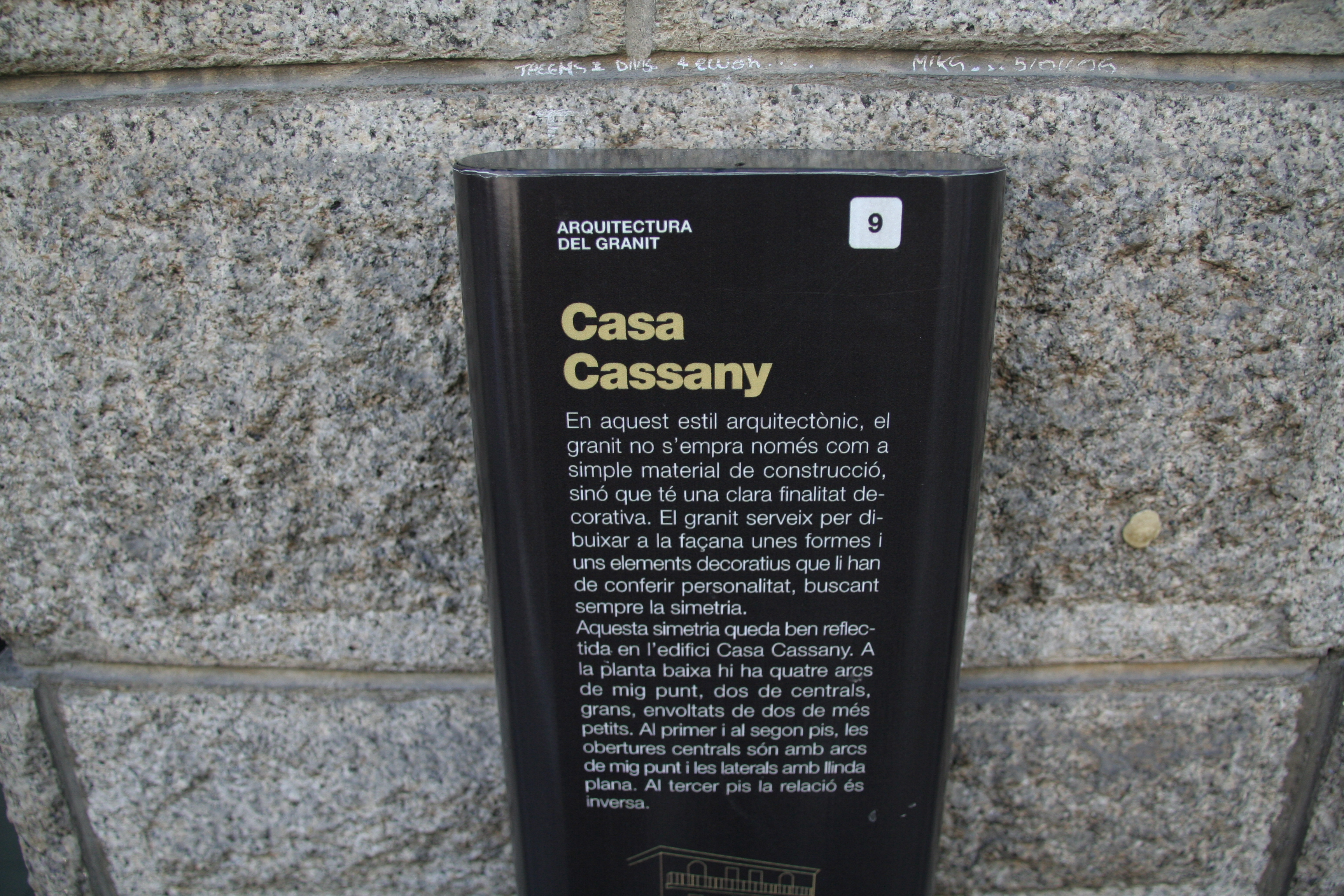 Antic Hotel Bellavista (Andorra la Vella)